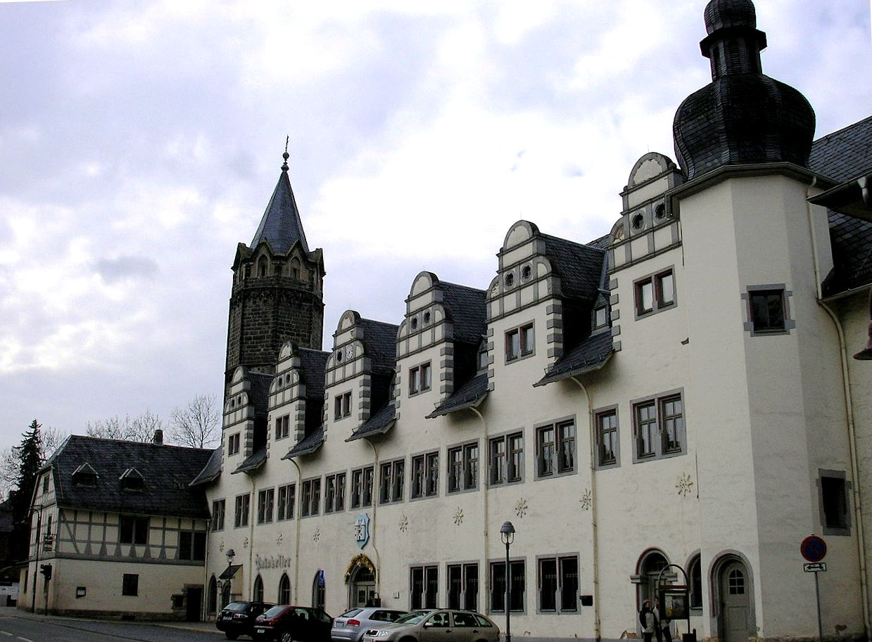 Das Rathaus in Stadtilm (Thüringen)